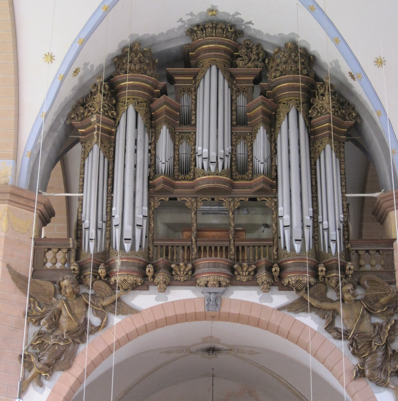 Orgel des Klosters Lamspringe